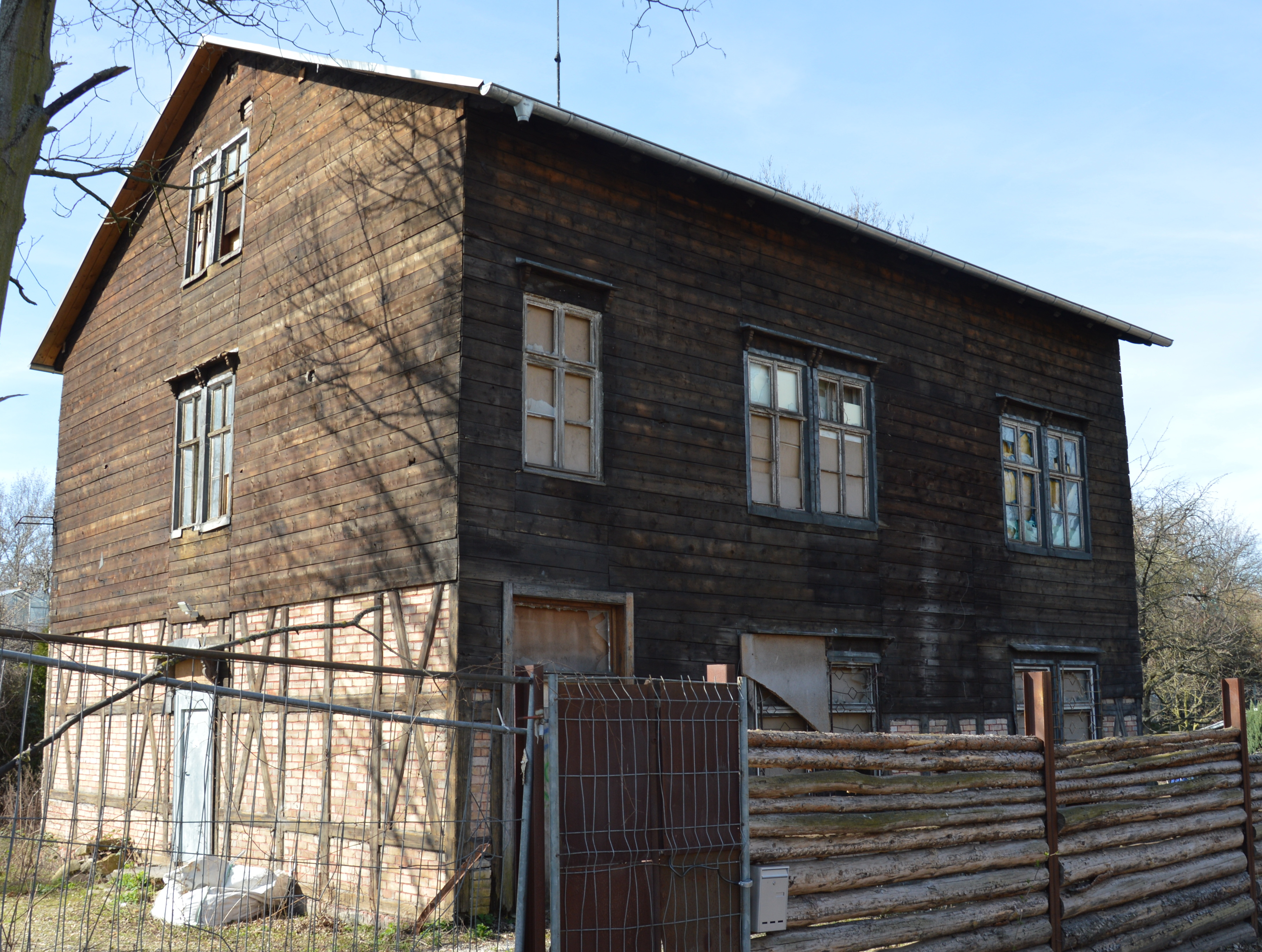 Haus Maybachstraße 3 in Magdeburg